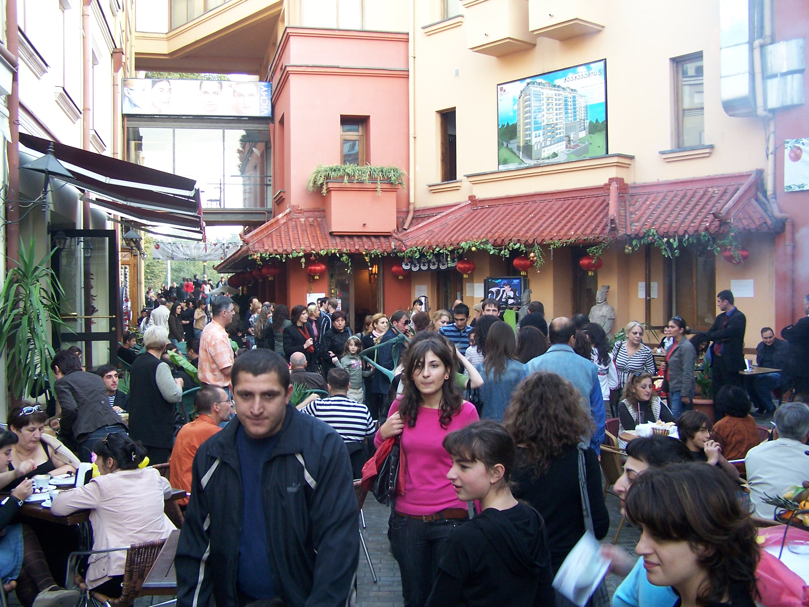 Tbilisoba 2007